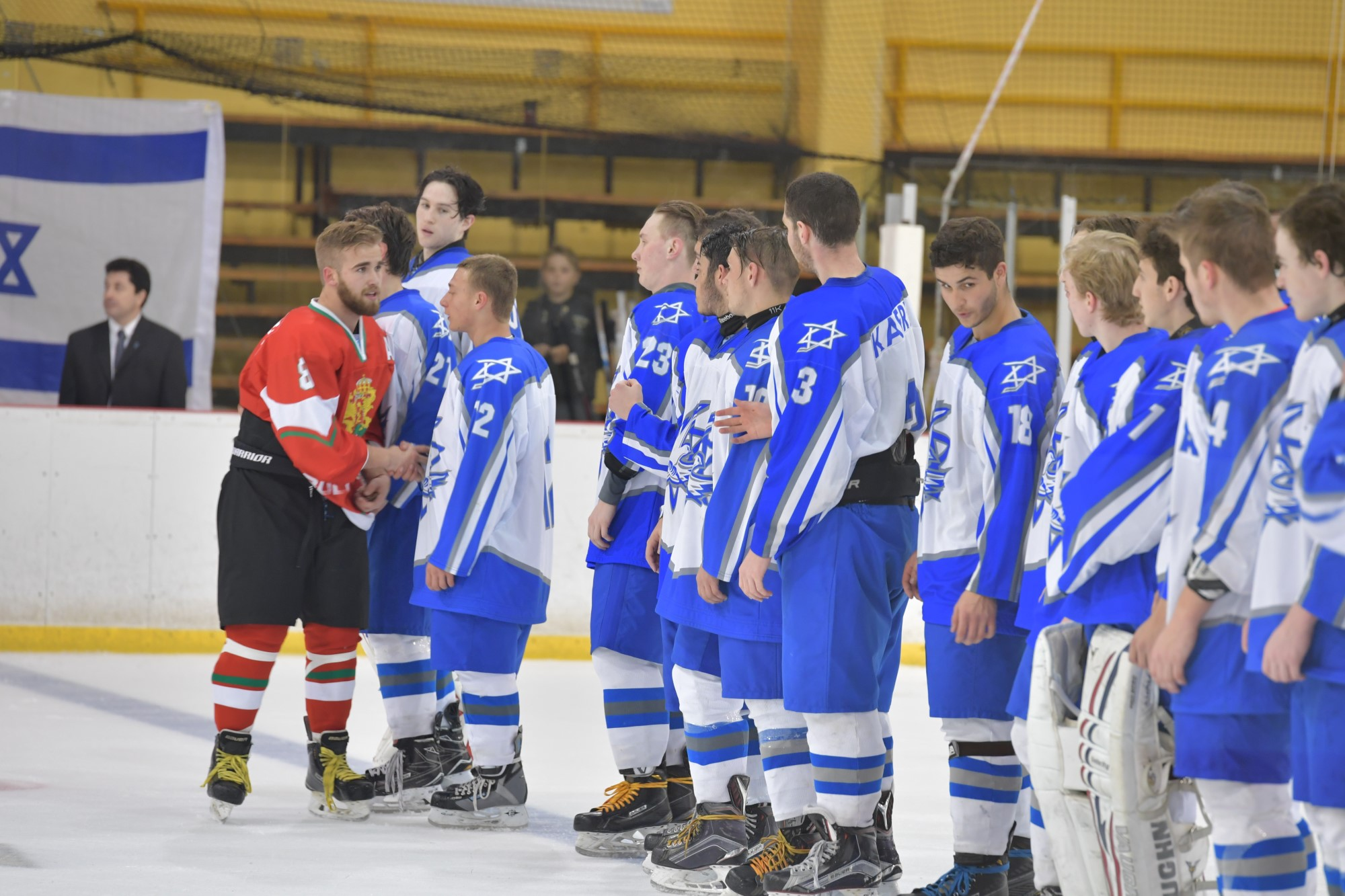 IIHF U20 Div 3 2017 Israel v Bulgaria